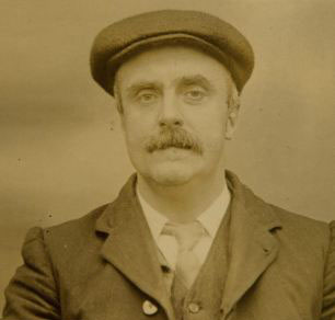 Photo d'identité judiciaire d'un Peaky Blinder - Thomas Gilbert